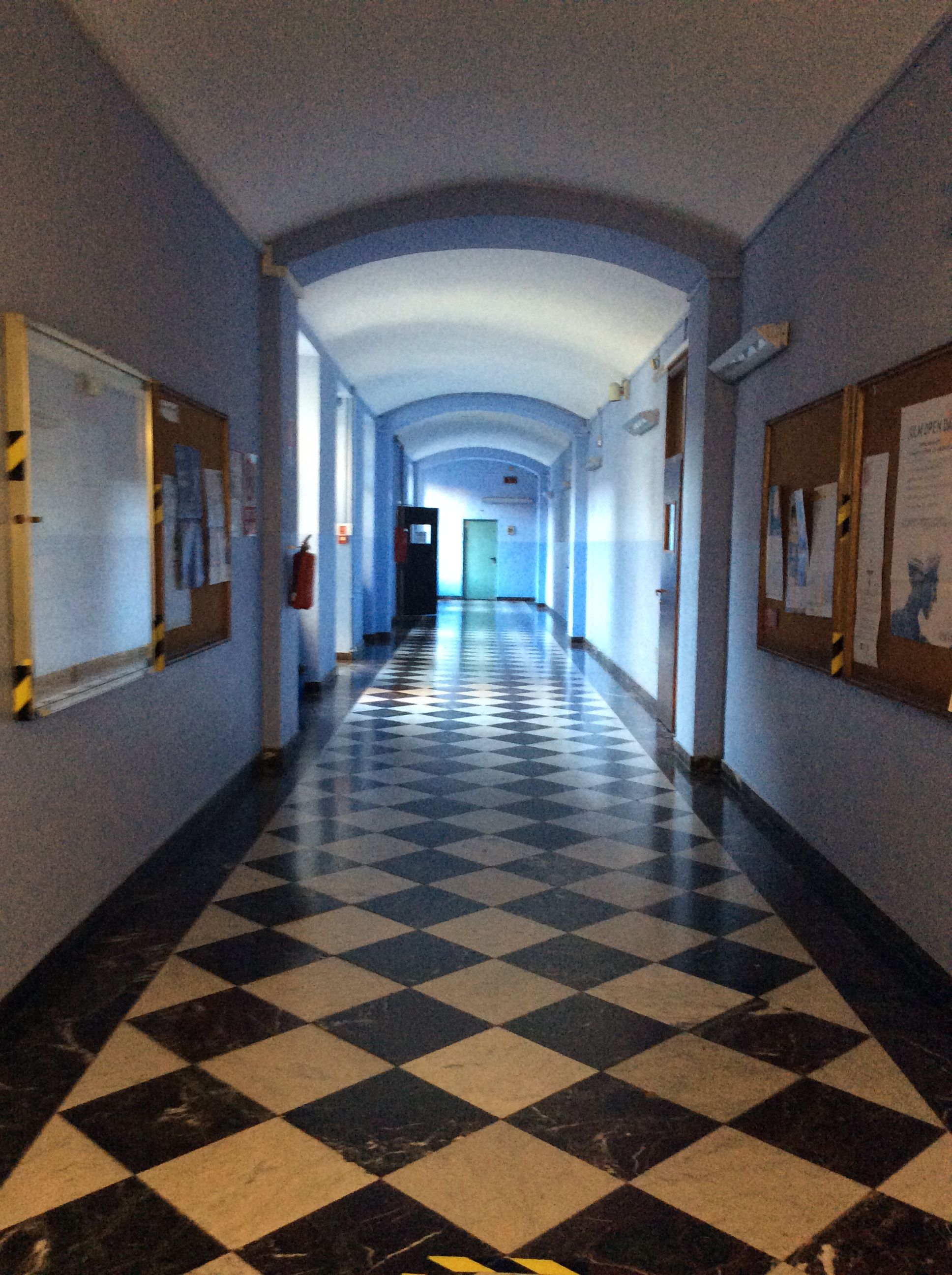 Massimo D'Azeglio Liceo